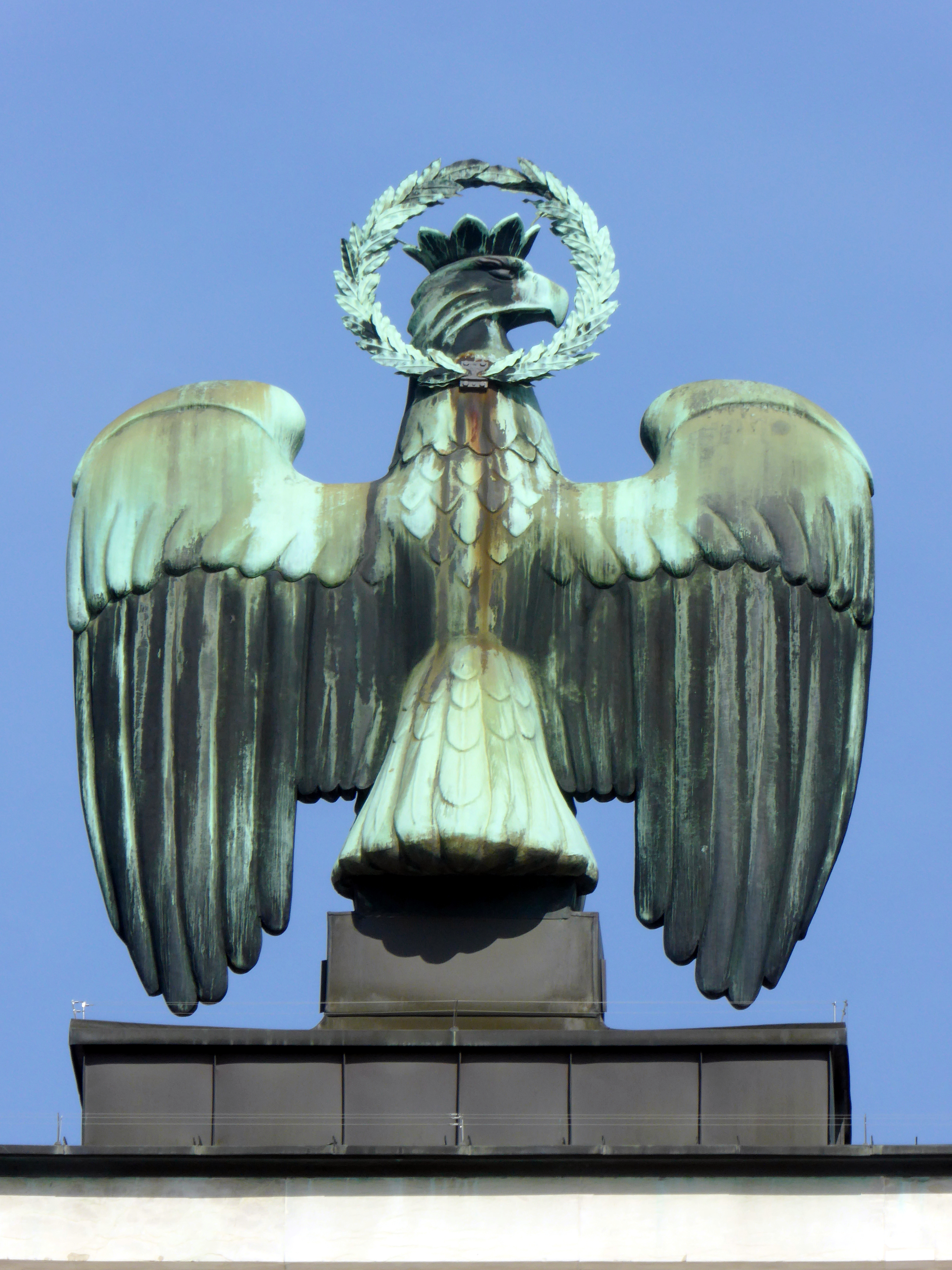 Innsbruck, Bronzeadler auf dem Befreiungsdenkmal auf dem Landhausplatz.